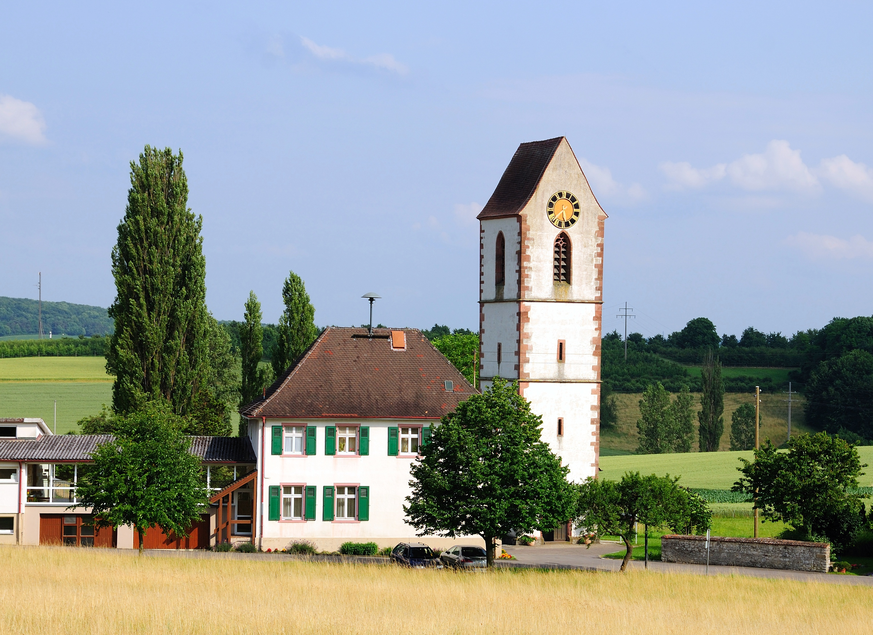 Peterskirche Blansingen